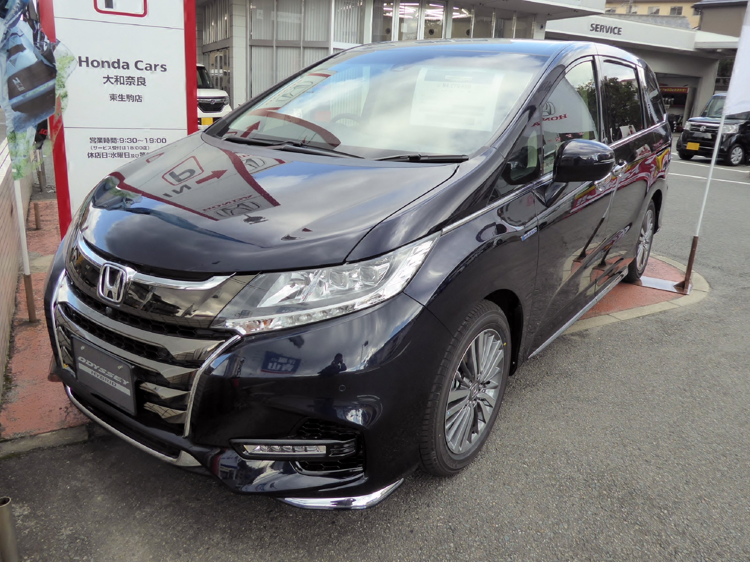 6AA-RC4型ホンダ・オデッセイHYBRID ABSOLUTE Honda SENSING EX Packageをフロントから撮影。